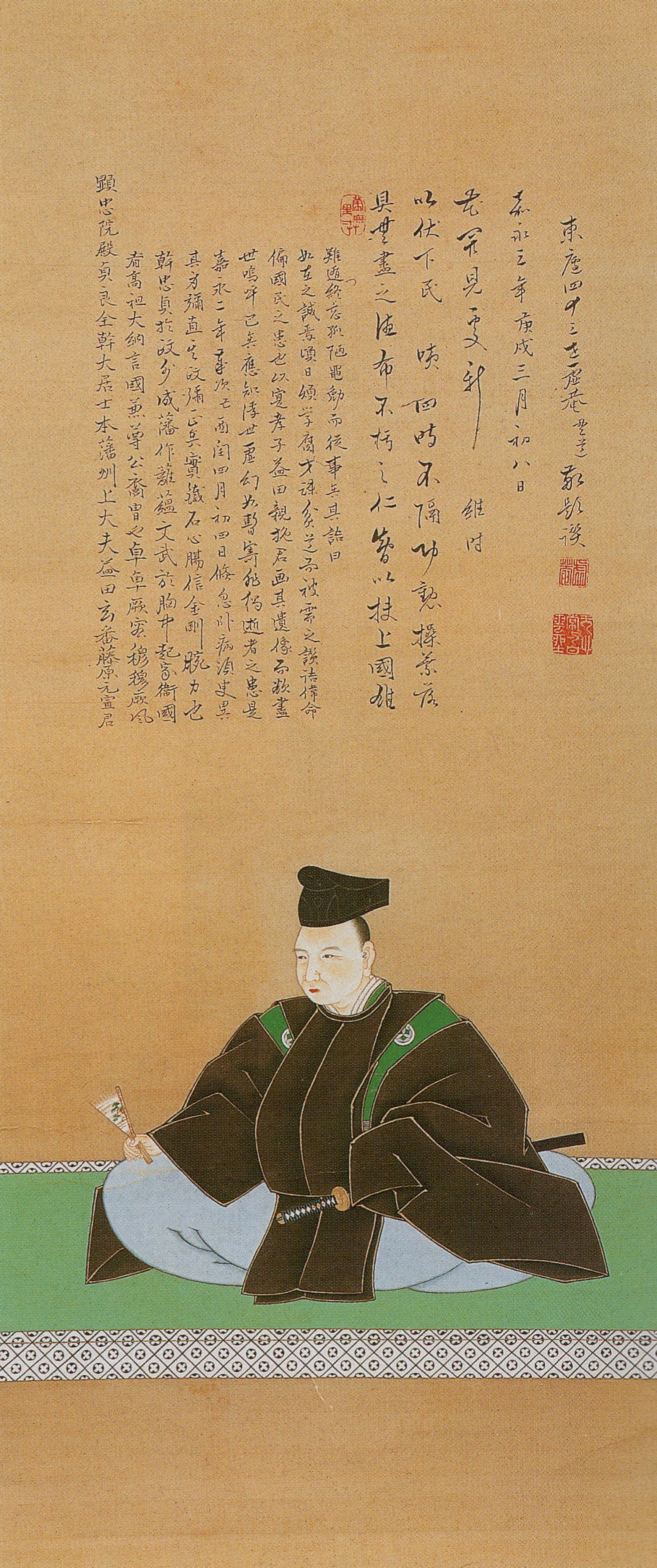 益田元宣の肖像。